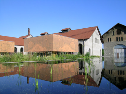 Inatura Erlebnis Naturschau Dornbirn mit Wassergarten im neuen Stadtgarten. (Foto: inatura, Norbert Gorbach)